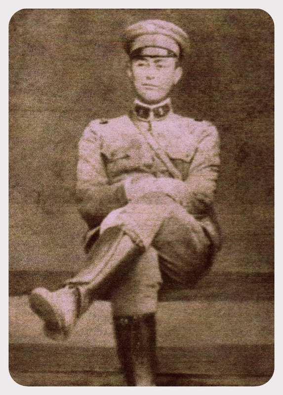 Gregorio Pomar